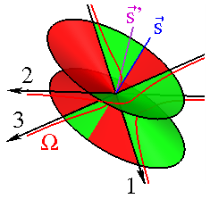 Staudescher Schwerpunktskegel mit Hauptträgheitsmomenten A = 8, B = 11, C = 16 und Schwerpunkt s = ( -6, -1, -8 ).